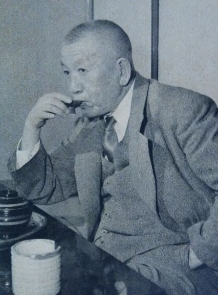 吉井勇